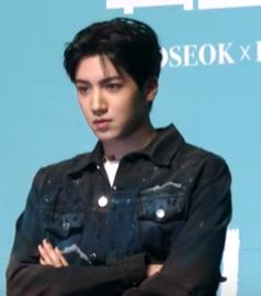 11일 오후 서울시 광진구 예스24 라이브홀에서 우석X관린의 첫번째 미니앨범 '9801' 발매 기념 쇼케이스가 열려 우석과 라인관린이 포토타임을 갖고 있다. 우석X관린의 첫번째 미니 앨범 '9801'은 두 사람이 태어난 연도인 '1998'과 '2001'을 합친 것으로 타이틀곡 '별짓'은 '스타'라는 뜻과 '태어나서 별짓을 다해본다'라는 중의적인 뜻을 답고 있는 힙한 R&B 트랙이다. 특히 별이라는 단어를 '별짓을 다 해', '별 꼴이야', '별미야'와 같이 위트 있게 활용해 두 사람의 매력이 한층 더 빛을 발한다.